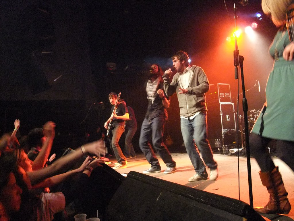 Flobots 121